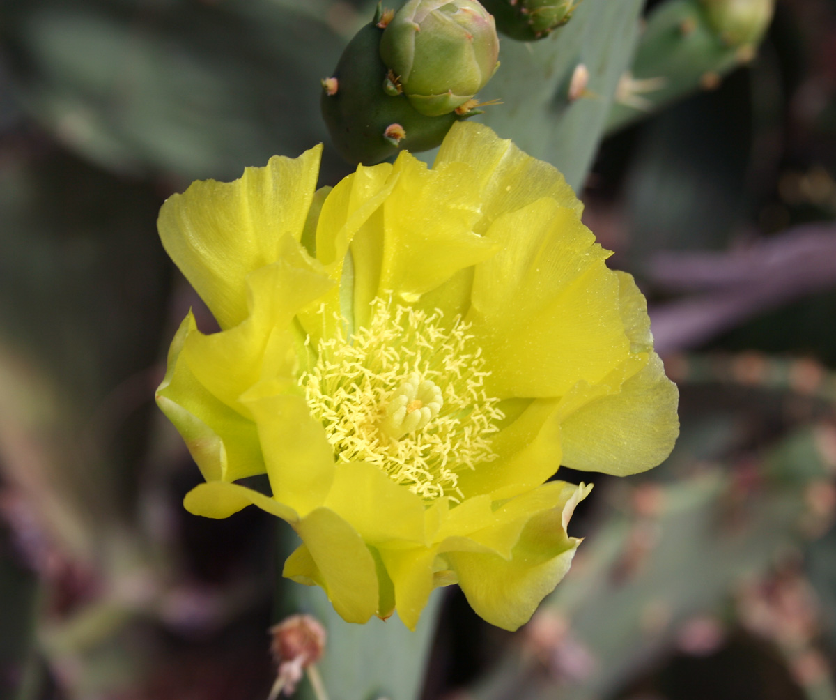 Photo by Seweryn Olkowicz Greece